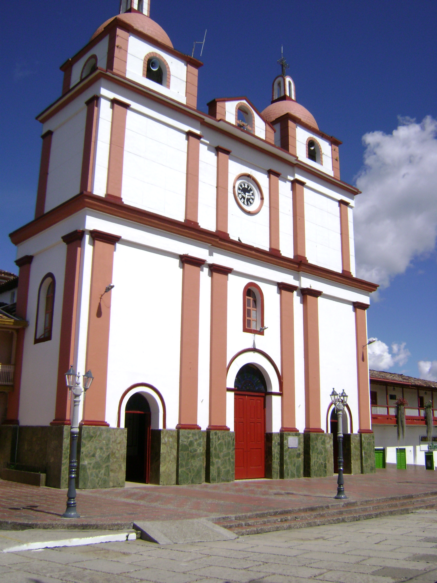 Iglesia de la Inmaculada Concepción del municipio de Carolina del Príncipe, Antioquia, Colombia.